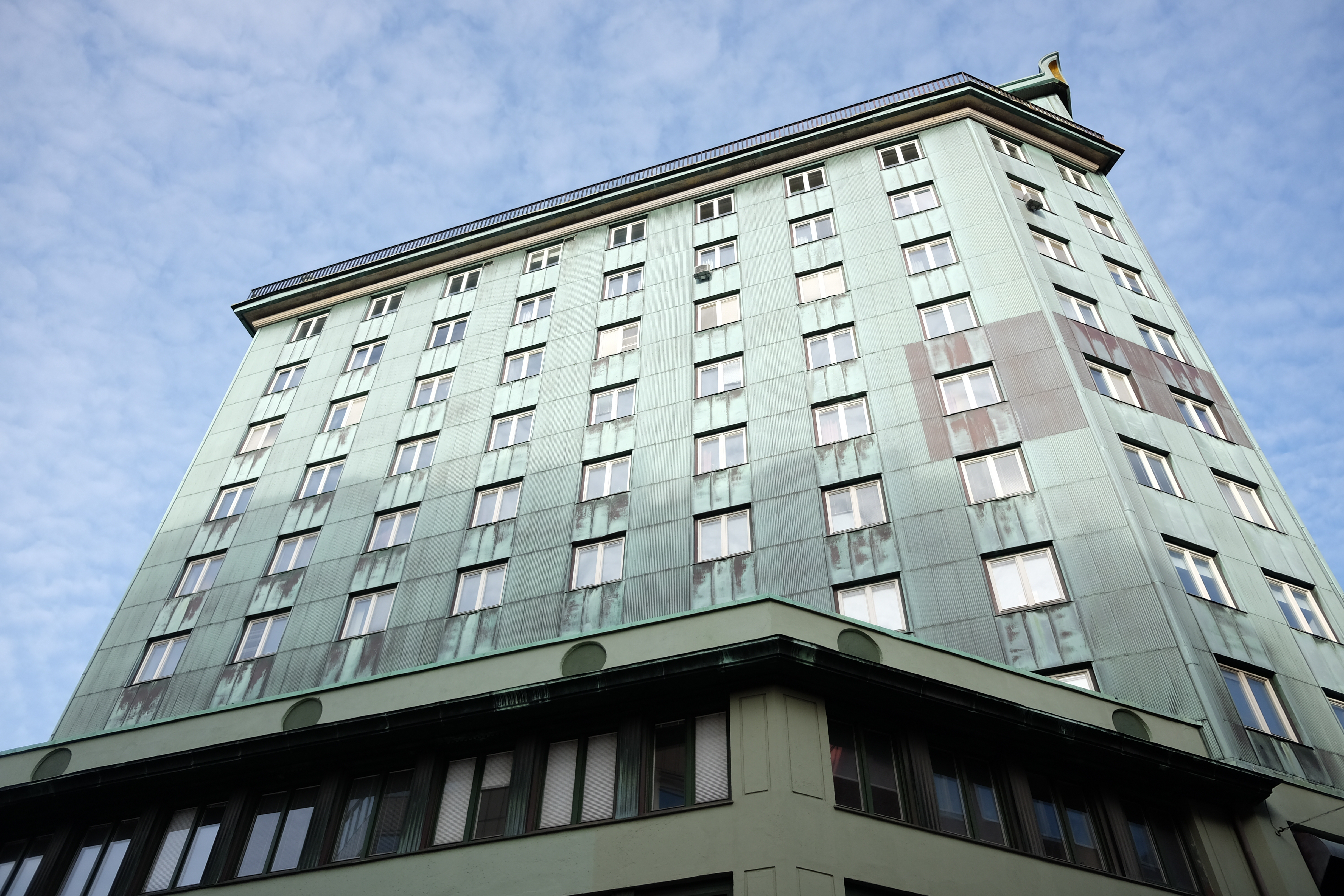 Otterhall, Inom Vallgraven, Göteborg.